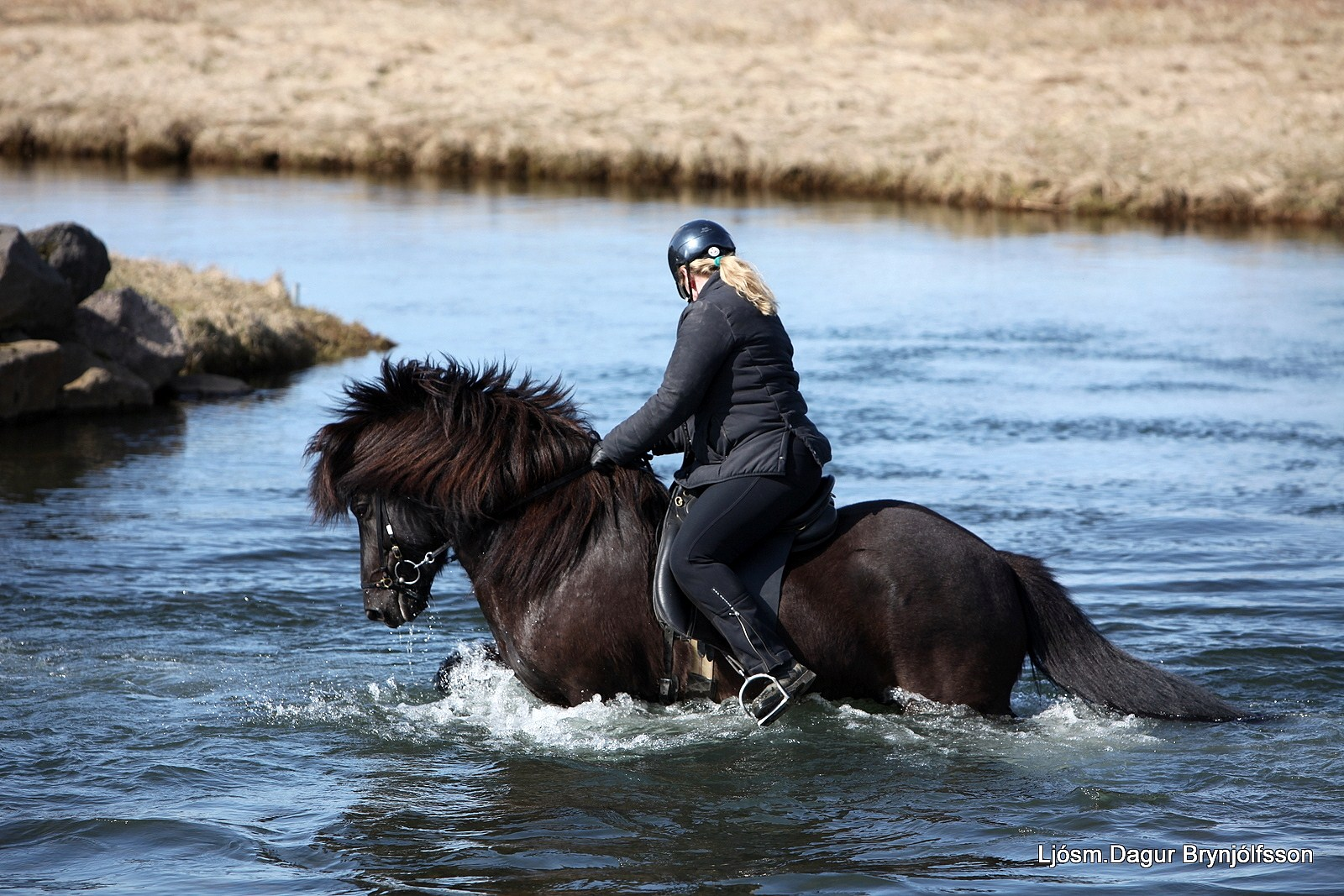 Icelandig horse